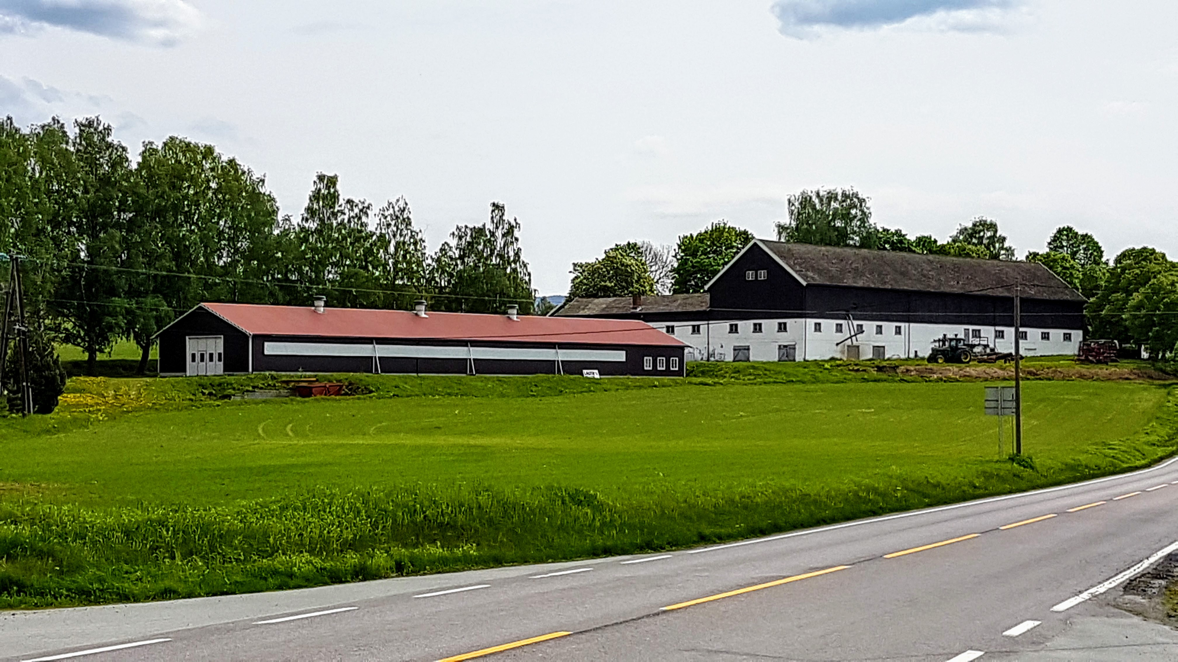 Driftsbygningene på Hverven